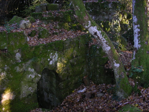 Abbaye du Charray